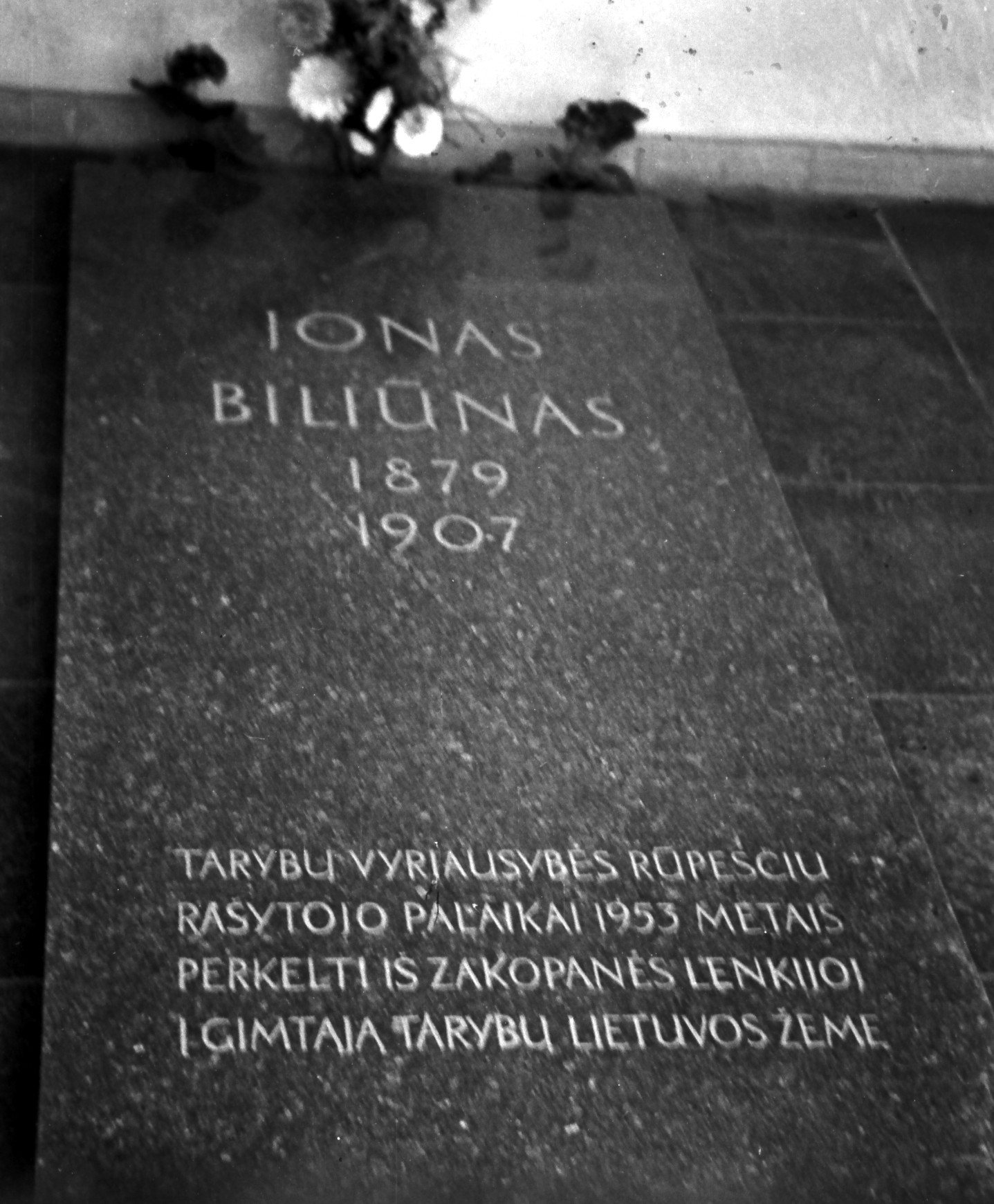 Jono Biliūno kapas 1975 m., Anykščiai